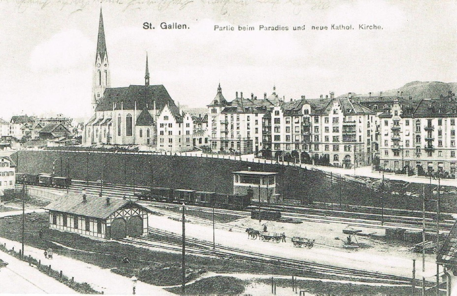 Remise der Appenzeller Strassenbahn auf dem Areal der späteren Güterbahnhofs der SBB in St. Gallen. Im Hintergrund ist die Pfarrkirche St. Otmar sichtbar.